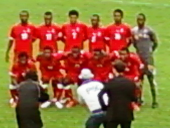 Equipe nationale de Guinée Equatoriale lors du match amical FC Issy - Guinée Equatoriale du 7 juin 2011 au stade Jean-Bouin d'Issy-les-Moulineaux.